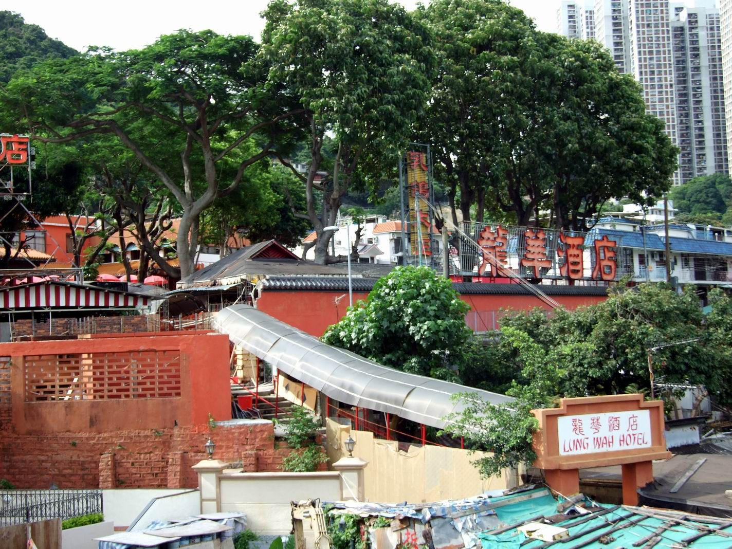 龍華酒店